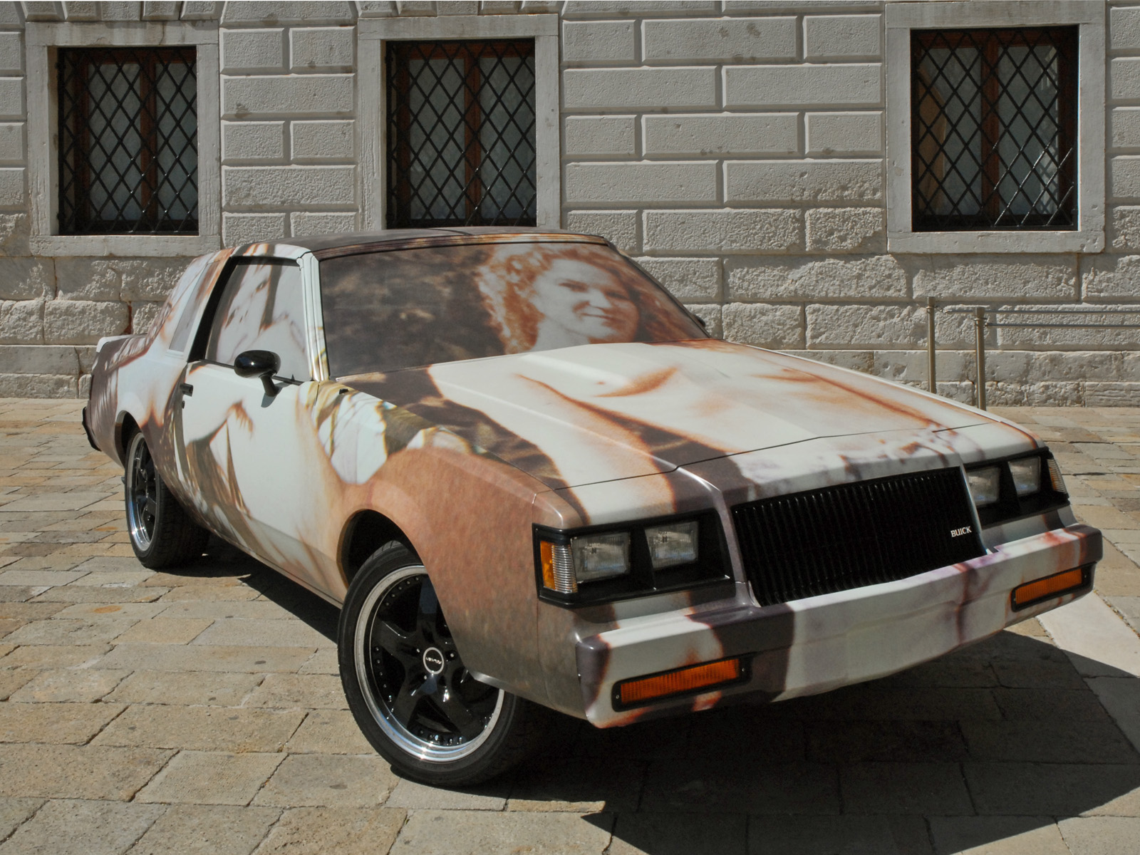 Oeuvre de Richard Prince (devant le palazzo Grassi) intitulée "Covering Hannah (1987 Grand National), 2008 Buick Regal de 1987 et emballage vynilique Le palazzo Grassi a été aménagé par l'architecte japonais Tadao Ando à la demande de François Pinault pour accueillir sa collection d'art contemporain.